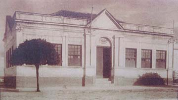 Antigo Paço Municipal de Campina Grande, inaugurado no dia 2 de dezembro de 1879, demolido em 1942.